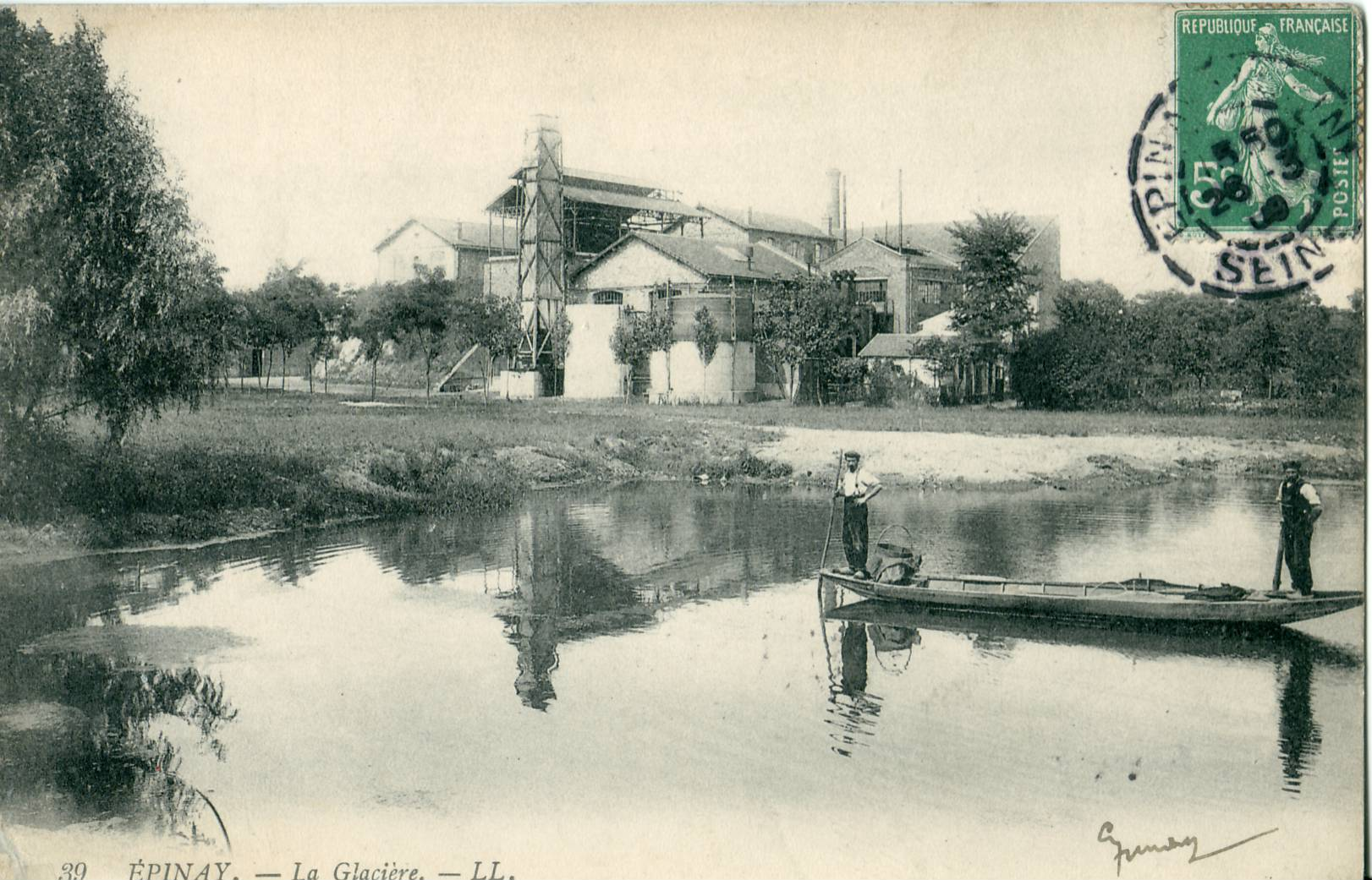 Carte postale ancienne éditée par Marmuse, N°8 ÉPINAY - La Glacière (Elle était implantée sensiblement à l'emplacement de l'étang de Coquenard, sans doute à l'emplacement des installations actuelles du SIAAP)